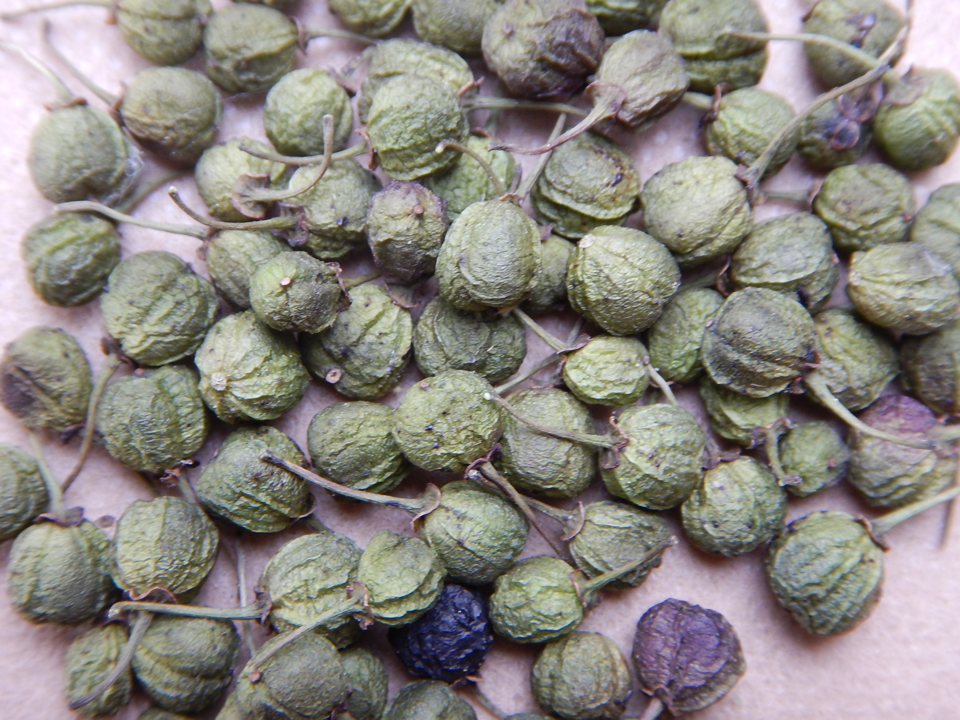 Unreife Früchte des Kreuzdorn (Rhamnus cathartica), als Gelbbeere im Handel (Färbemittel)